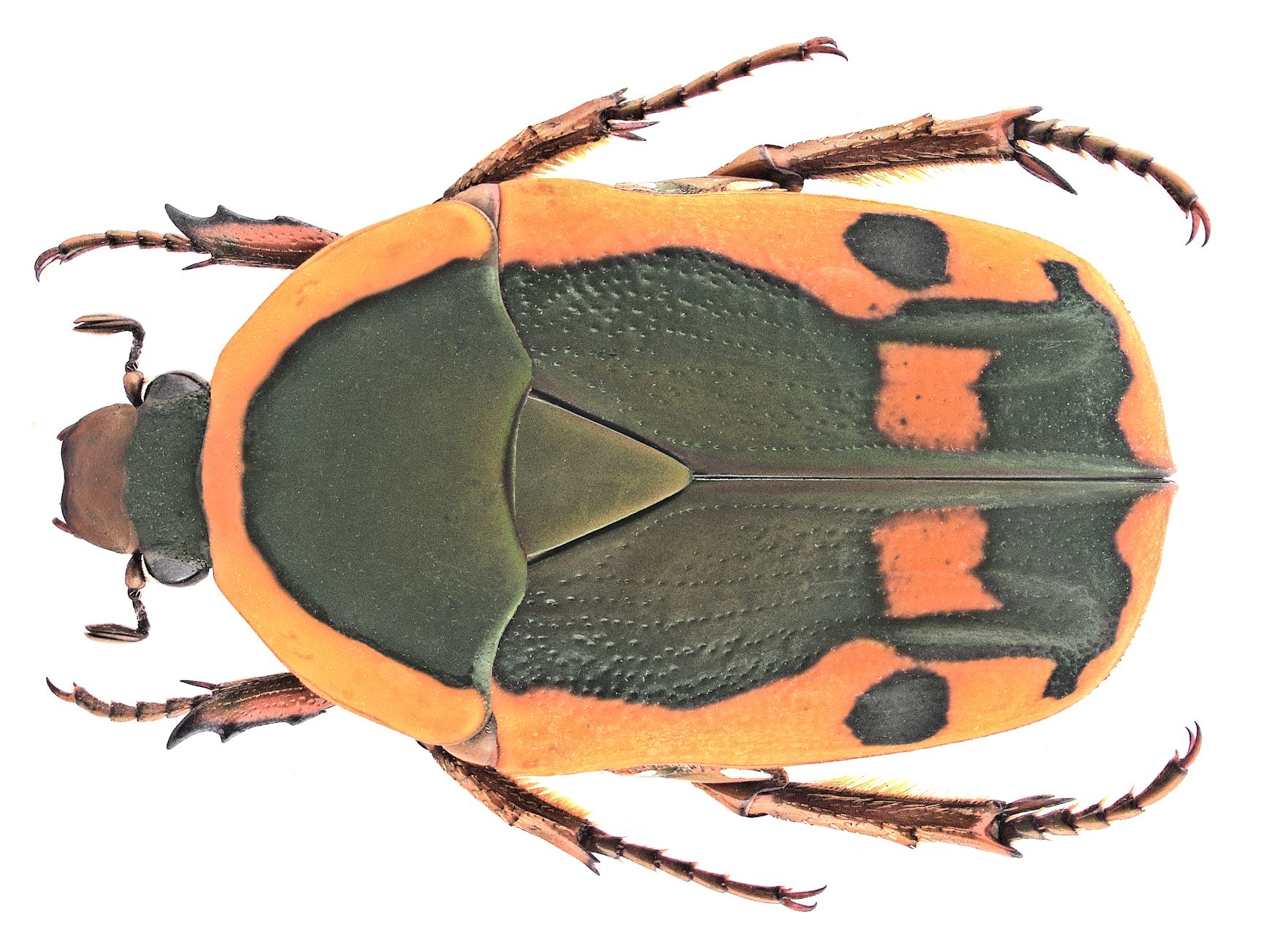 Familie: Scarabaeidae Grösse: 17-22 mm Vorkommen: Zaire, Zimbabwe, Malawi, Tanzania, Südafrika Fundort: Malawi leg. 1971; det. U.Schmidt Foto: U.Schmidt, 2007